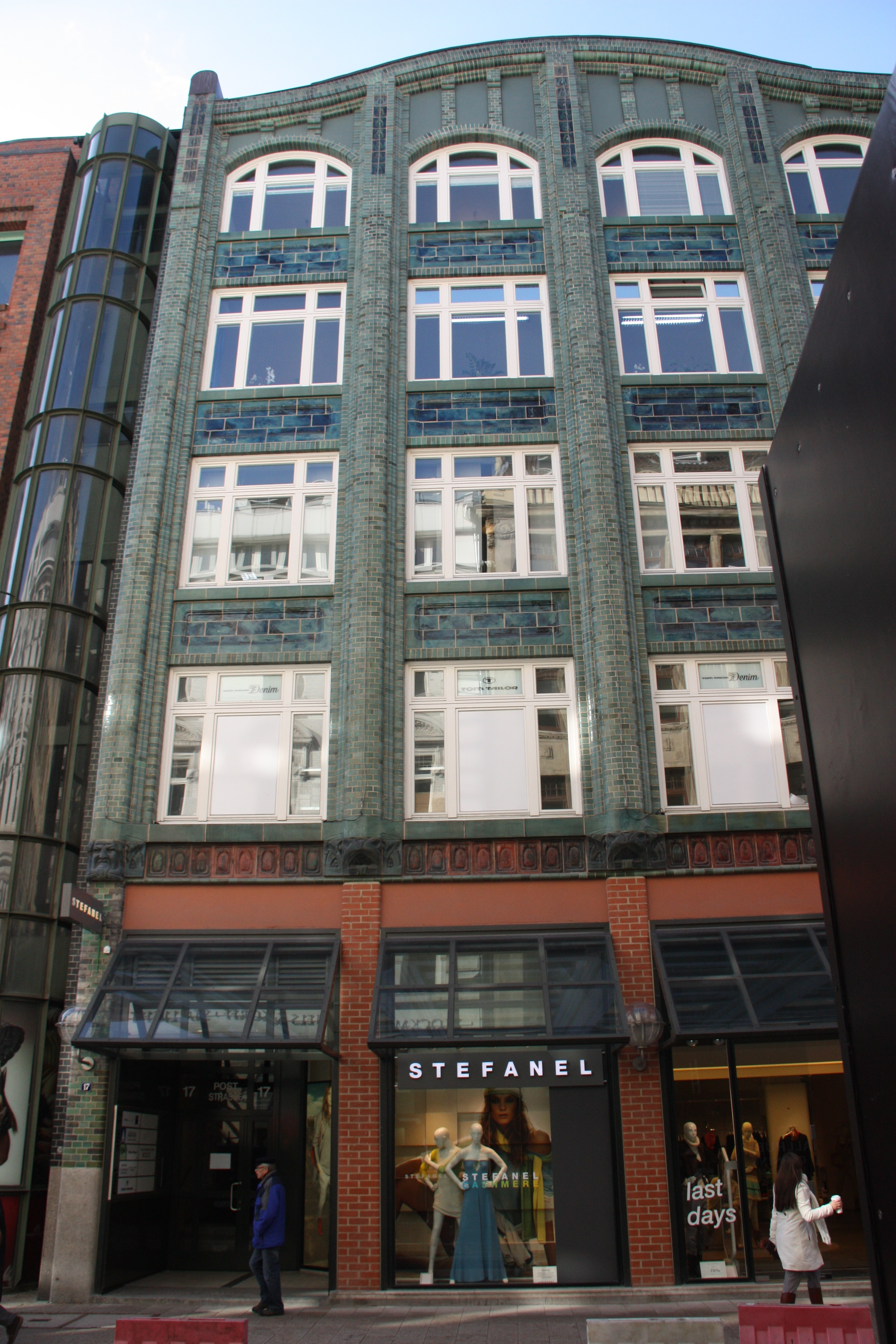 Hamburg, Kontorhaus, Poststr. 17-19 This is a photograph of an architectural monument.